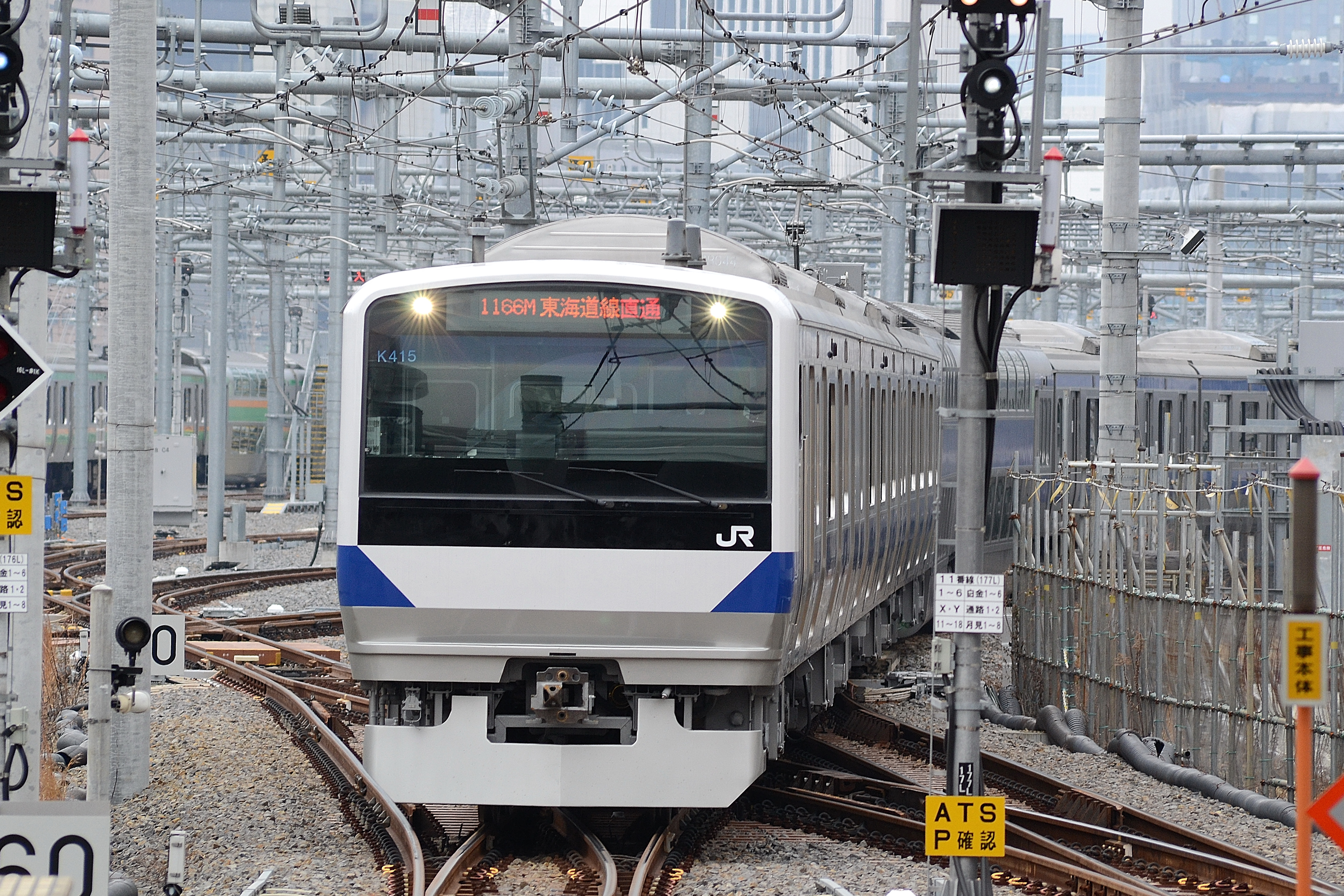 品川駅9番線ホームに進入する常磐線のE531系